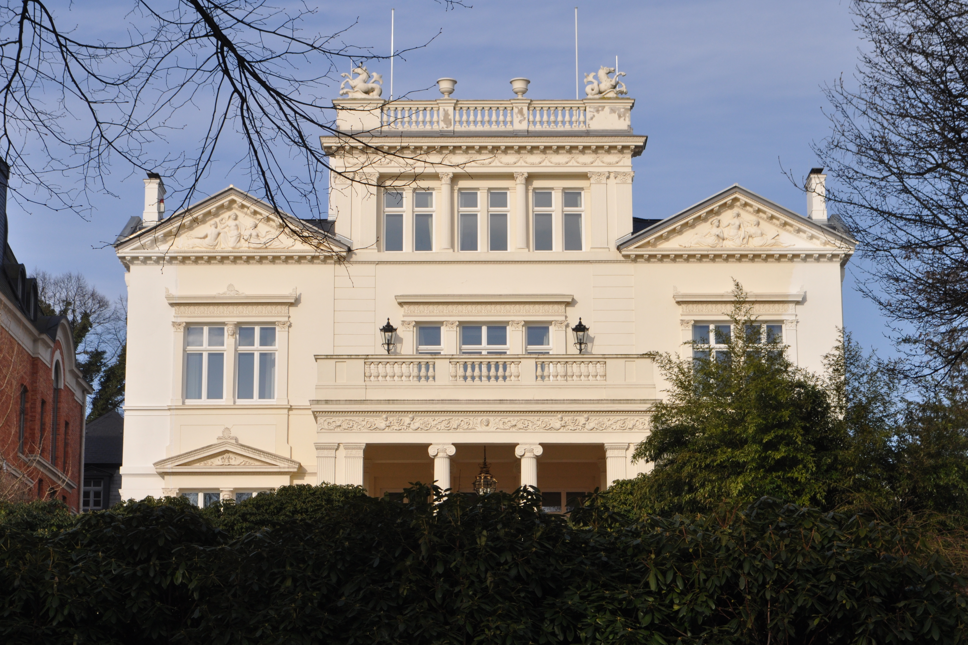 Villa Magdalenenstraße 64a in Hamburg-Rotherbaum, erbaut 1870. This is a photograph of an architectural monument.